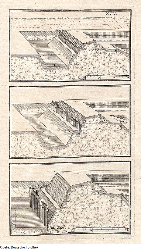 Original image description from the Deutsche FotothekArchitektur & Geometrie & Festungsbau & Befestigung & Schanze & Wall & Graben